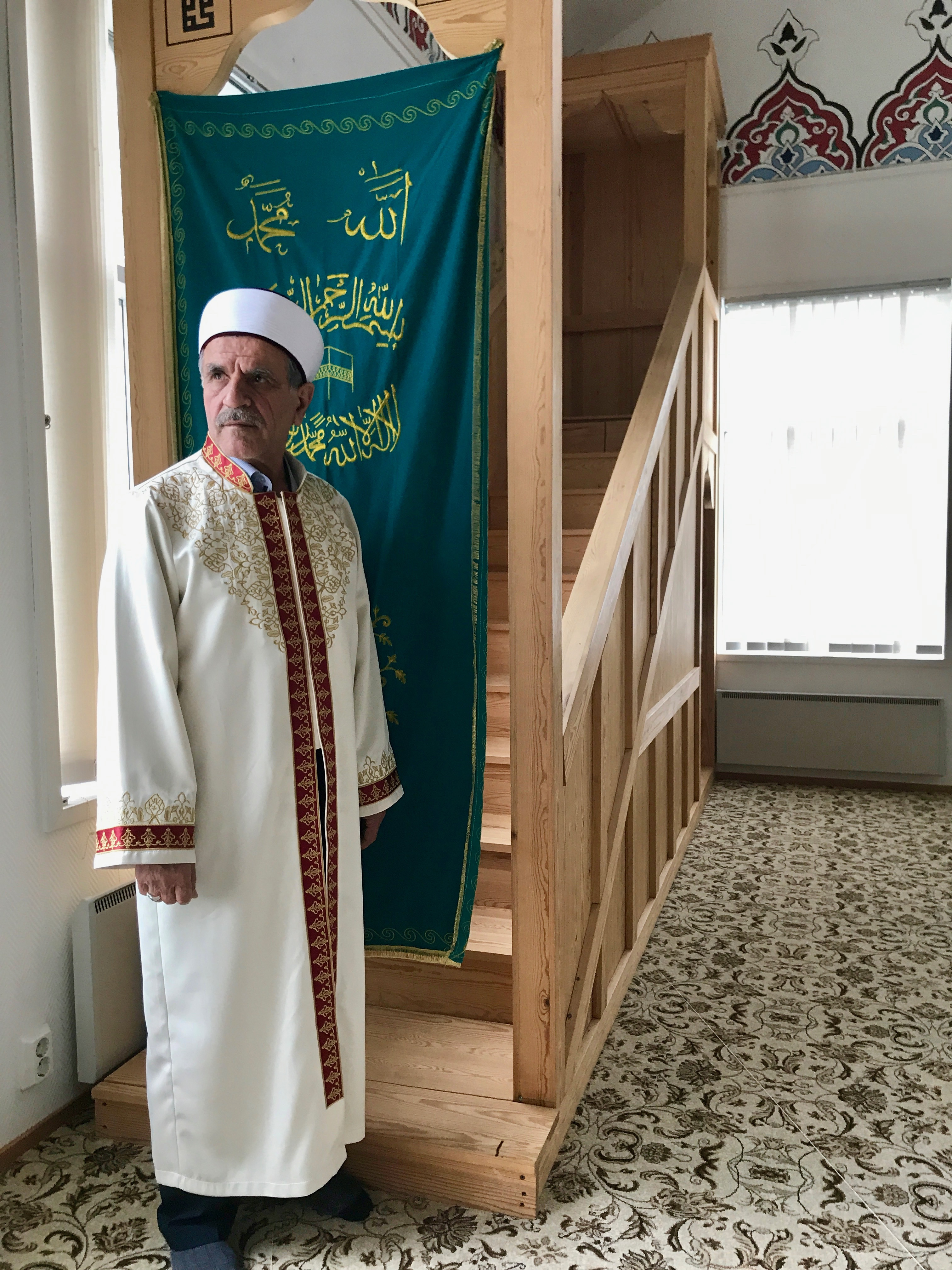 Lahden moskeijan imaamin virkapuku (cübbe) sekä päähine (sarik).